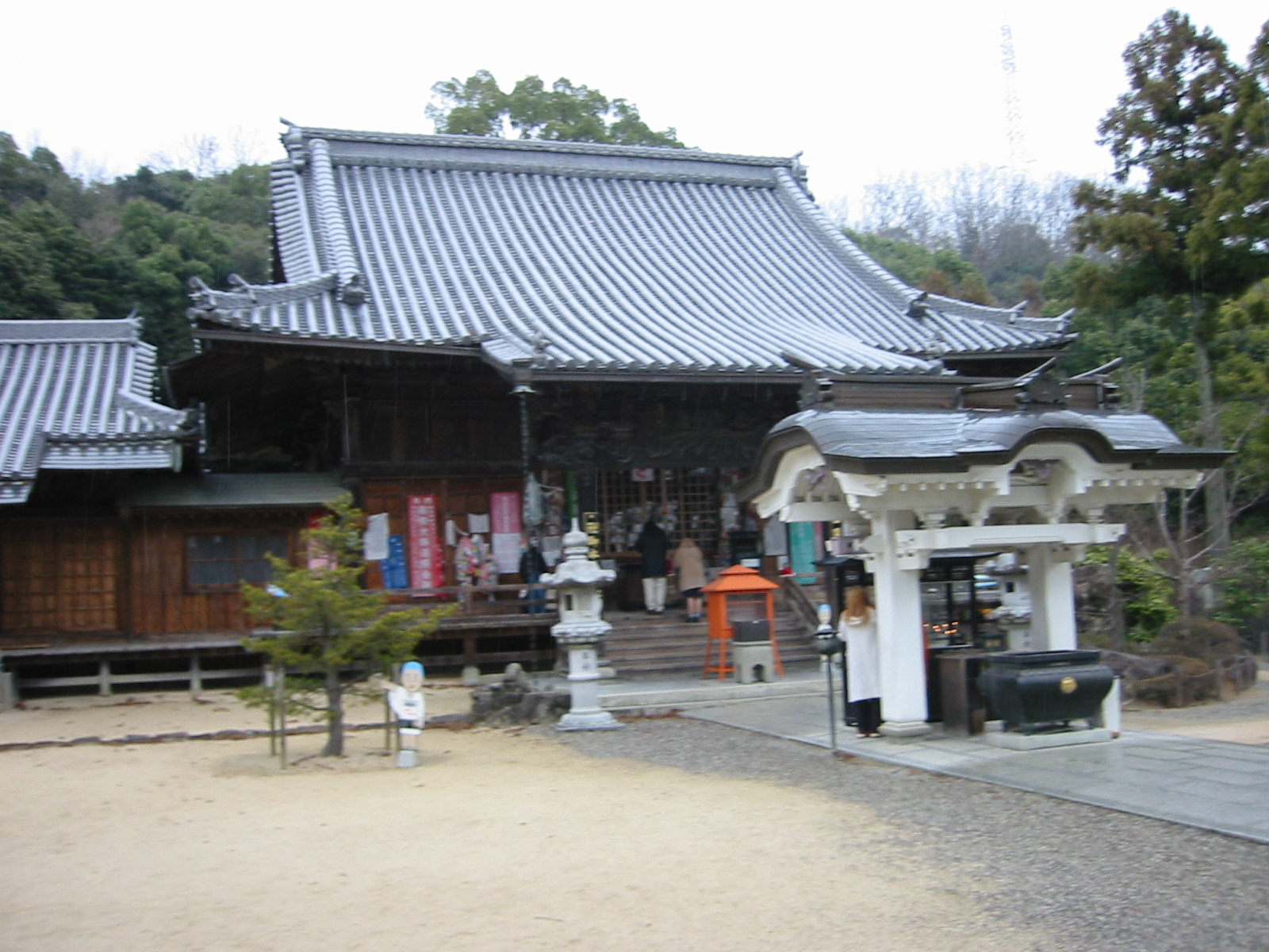 三番札所 金泉寺